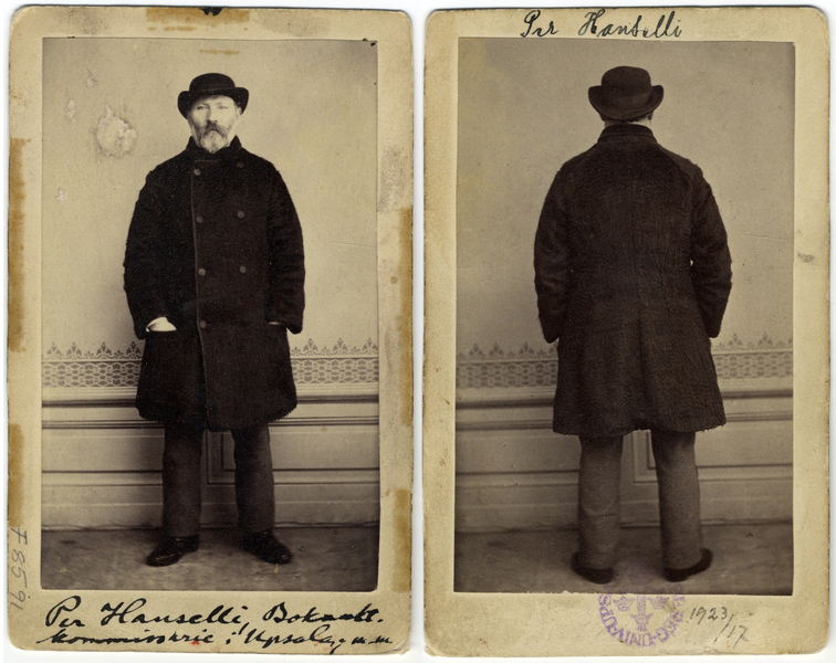 Per Hanselli (1815-1879), publisher, Uppsala